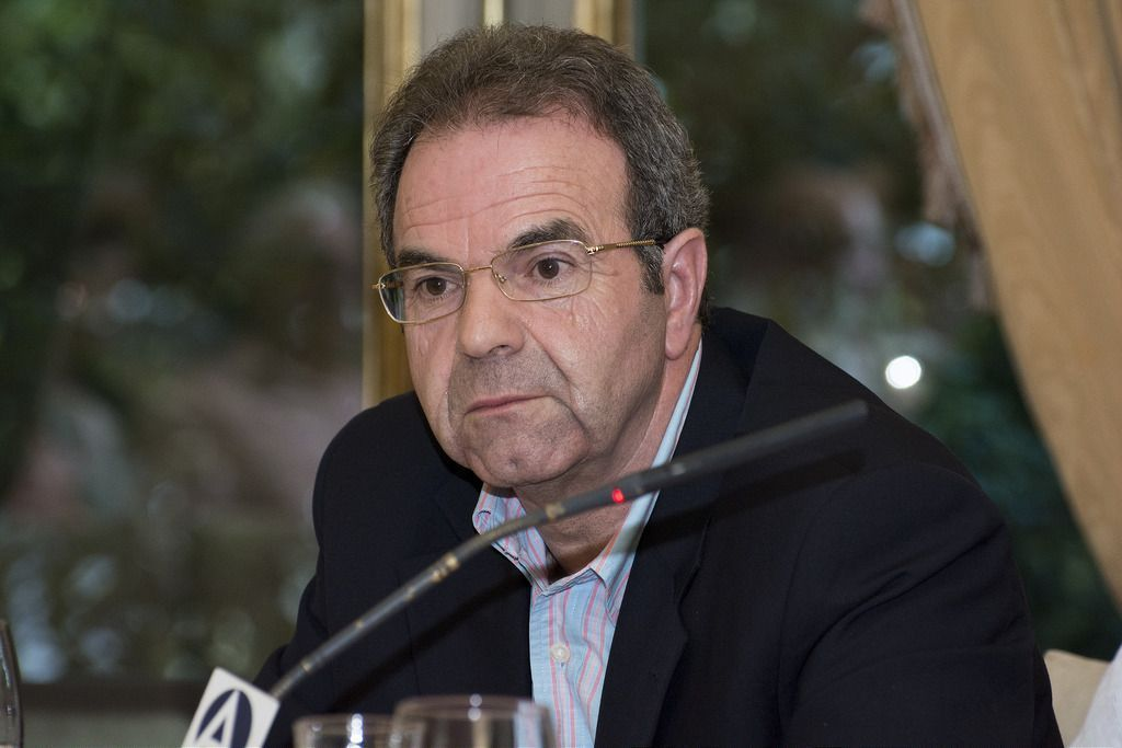 Poeta